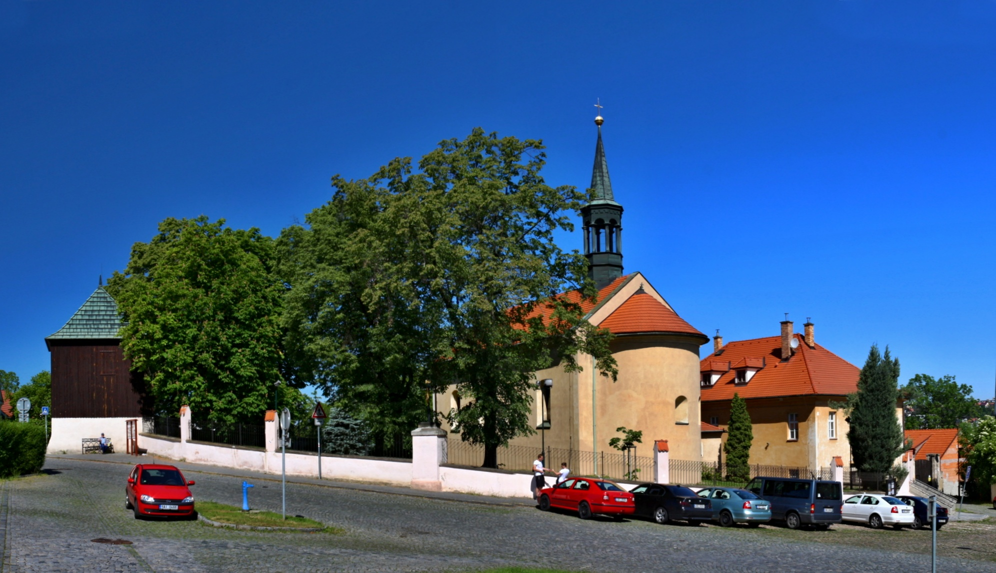 Hostivařský kostel Stětí sv. Jana